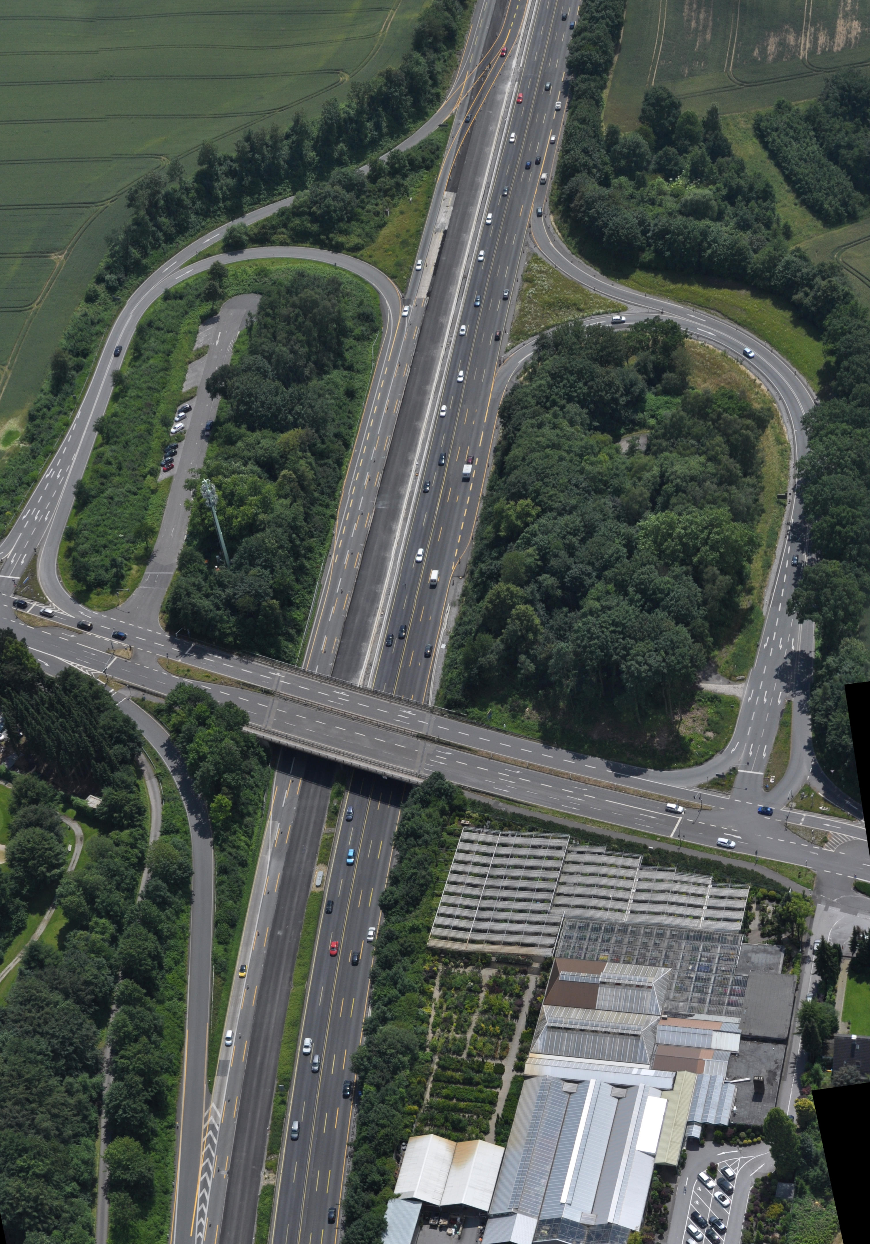 Anschlussstelle Mettman an der Bundesautobahn A3; es quert die Bundesstraße 7. Links oben ist in einem der Auffahrt"ohren" ein Mitfahrerparkplatz zu sehen Aufnahme von Norden; Luftbild aus ca. 600m Höhe über Grund